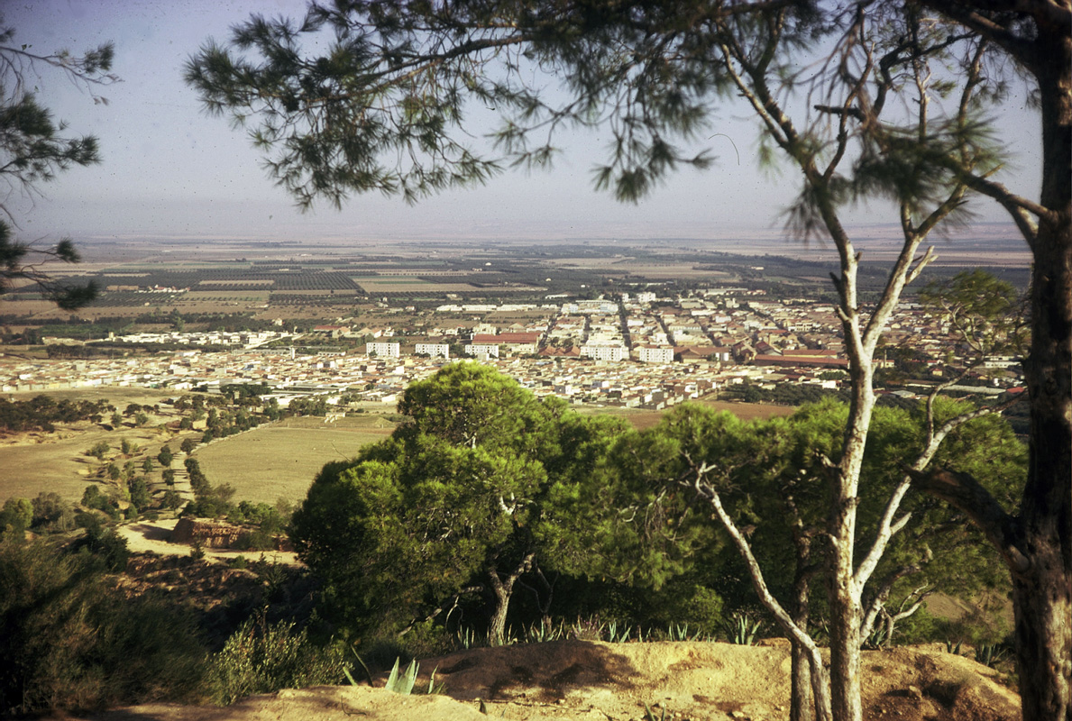 Vue de Sig (Mascara, Algérie) à partir de la pinède du Djebel bou Sella.